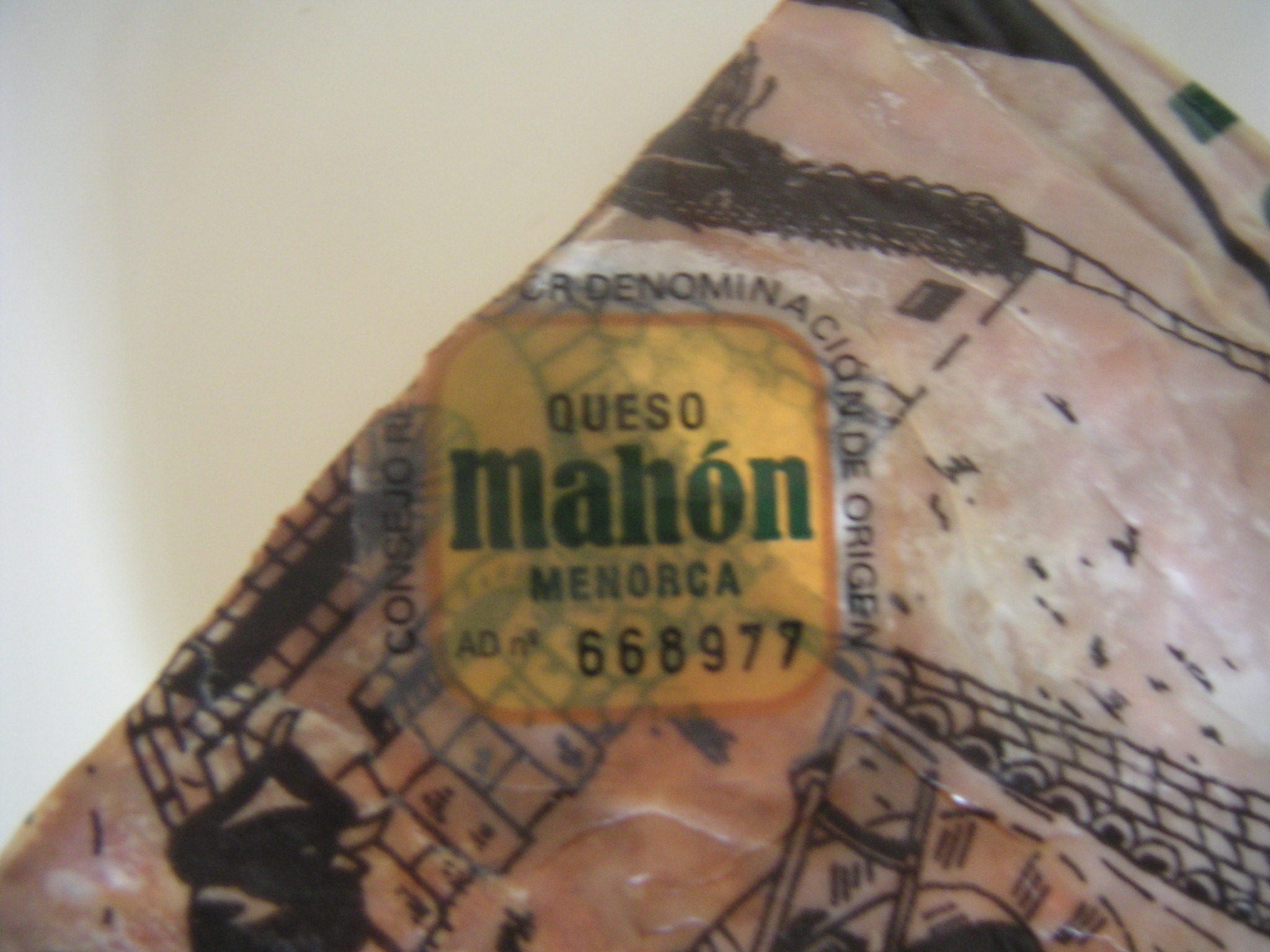 Denominacio d'origen. Etiqueta que certifica que un formatge és de Mao (Menorca).